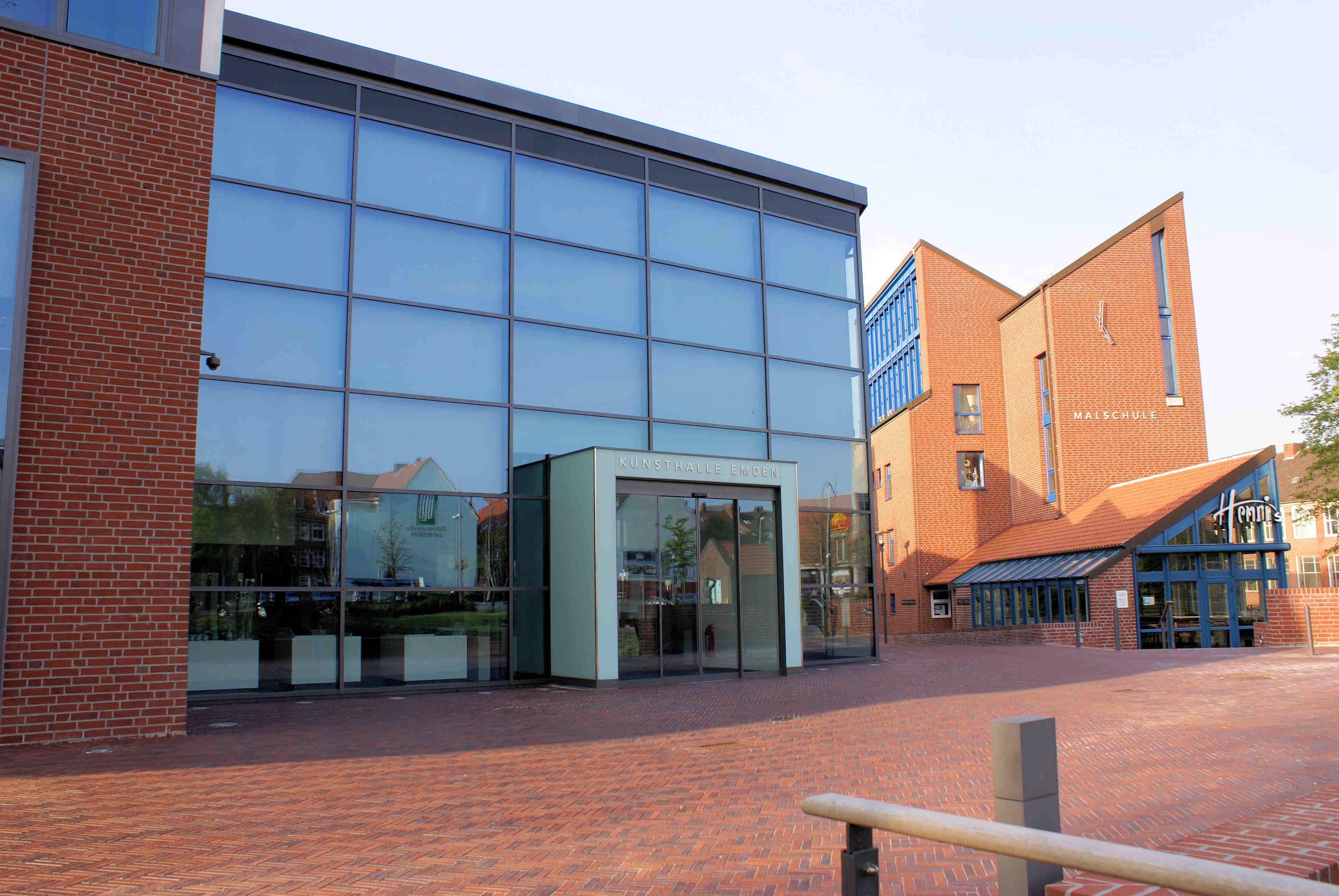 Kunsthalle in Emden Eingangsbereich